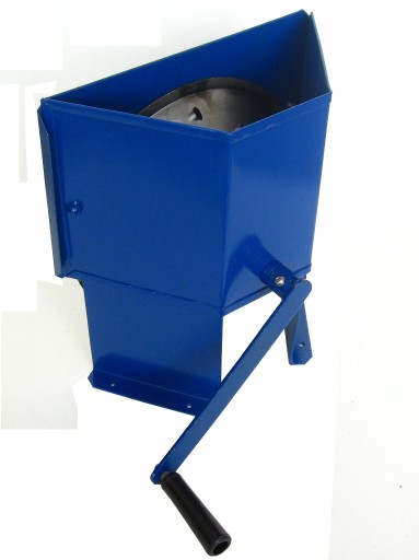 Тёрка механическая